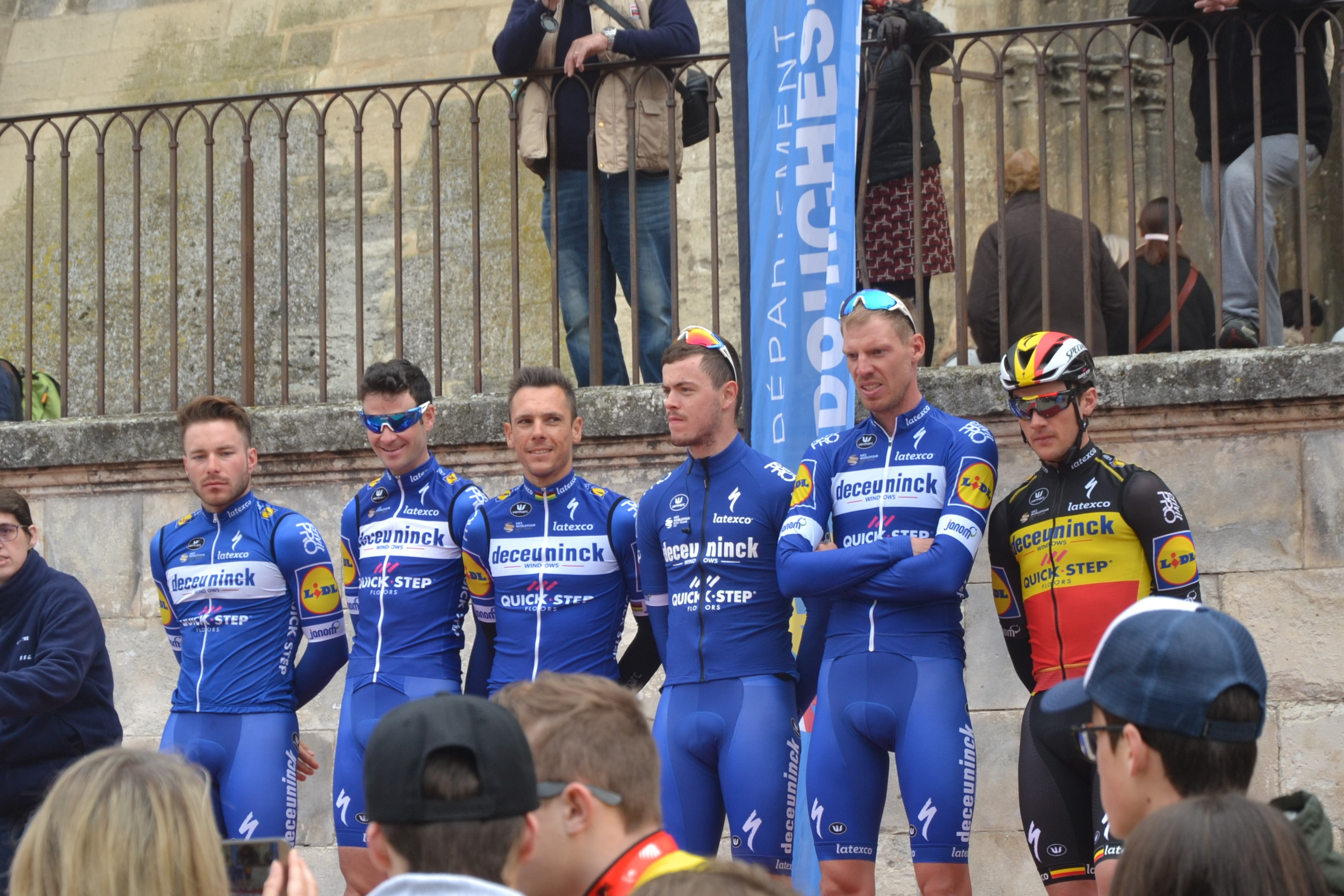 Lors du podium des signatures avant départ de l'étape